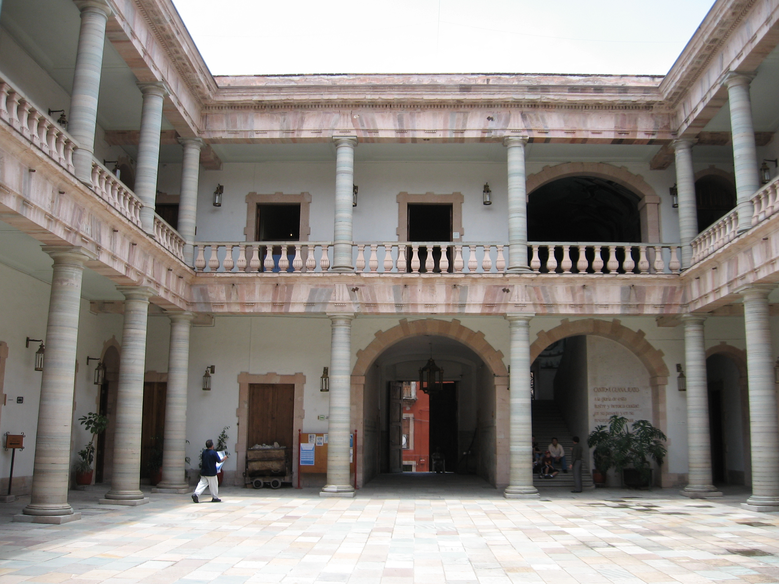 Guanajuato